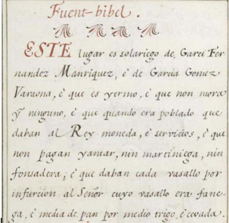 EdadMediaFU